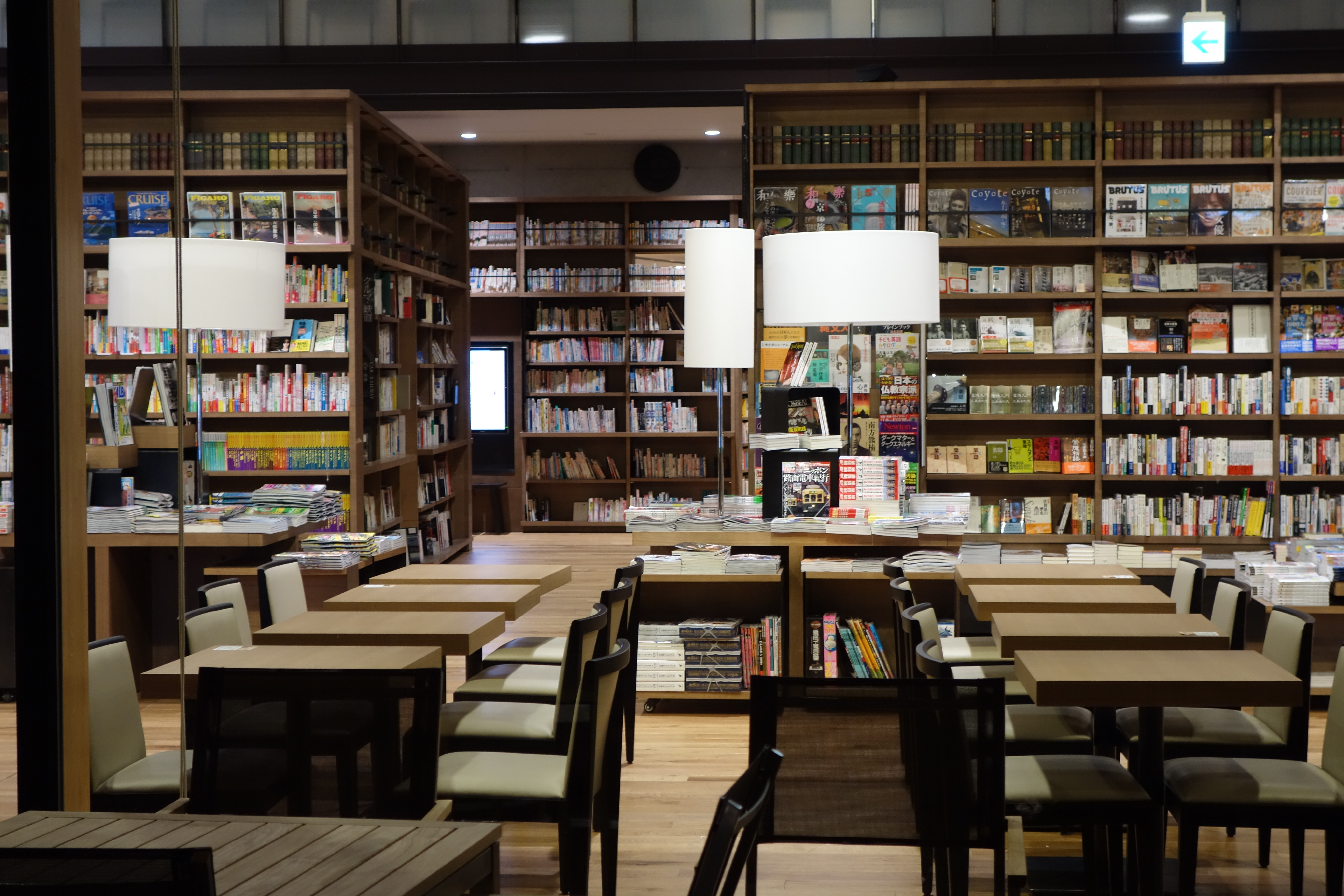 武雄市図書館（屋外から撮影※） ※武雄市図書館が屋内撮影禁止とする理由として、「誰が、いつ、どこにいたかということは重大なプライバシーだから、市長がお願いして撮影禁止にした」と市長が答弁したとありましたので、屋外から人物のいない閉館後に撮影しています。